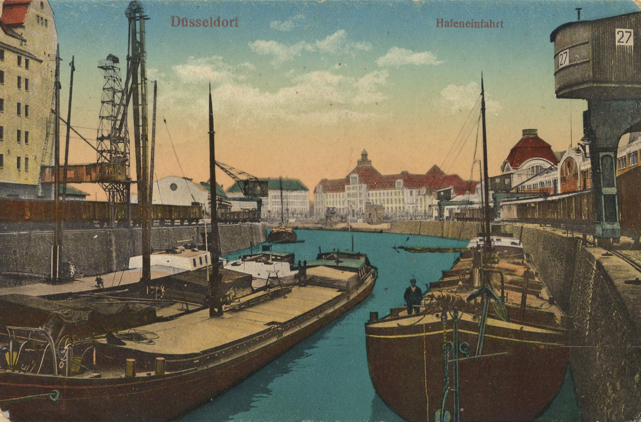 Hafeneinfahrt